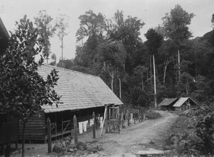 Foto. Bivak Meloewak, Gajolanden